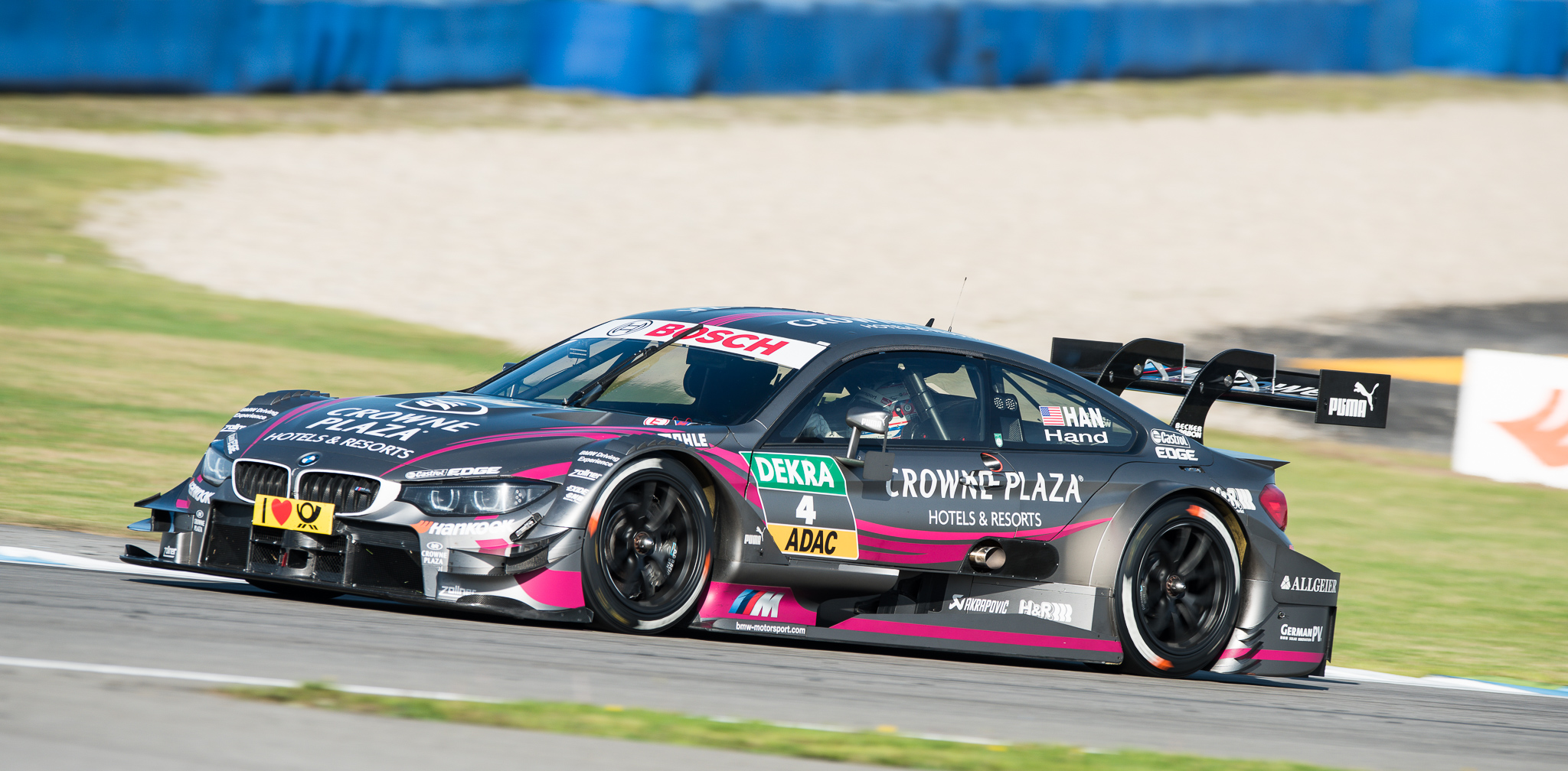 Crowne Plaza Hotels BMW M4 DTM,DTM,Deutsche Tourenwagen Masters,Hockenheimring,Joey Hand,Motorsport,RBM,Racing Bart Mampaey